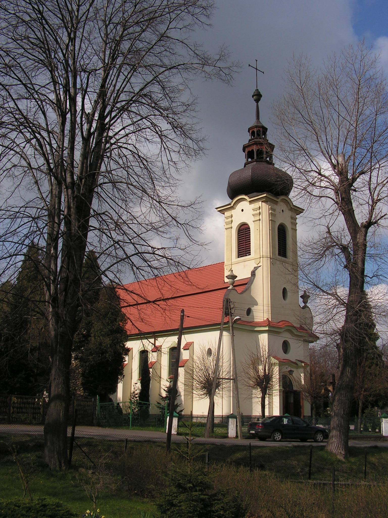 Stanowice (gmina Strzegom) - kościół filialny p.w. Najświętszego Serca Pana Jezusa (zabytek nr rejestr. A/1755/1197)